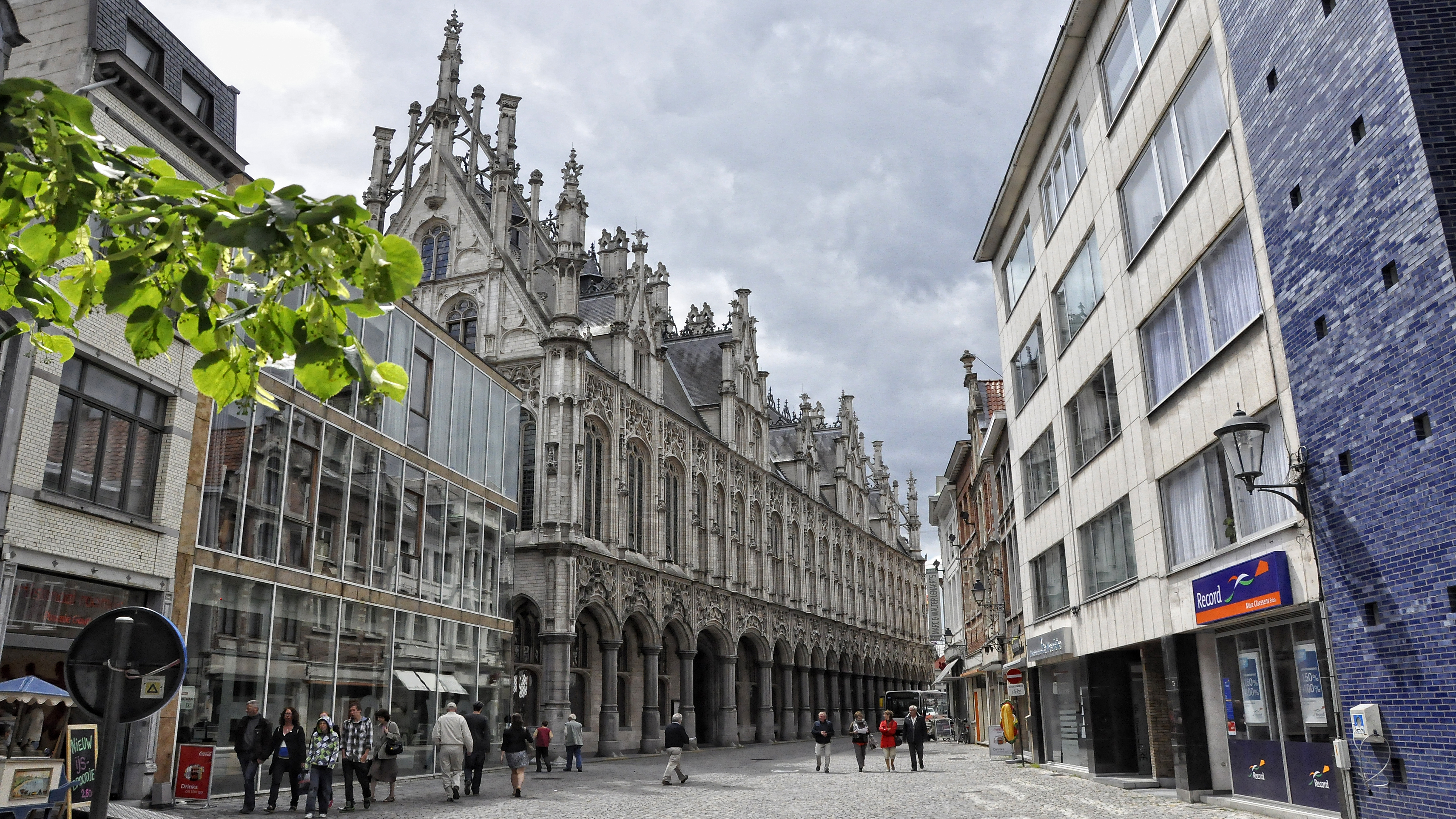 De noordelijke zijde van het stadhuis van Mechelen (België), gebouwd voor de Grote Raad van Mechelen maar waarin hij nooit zetelde